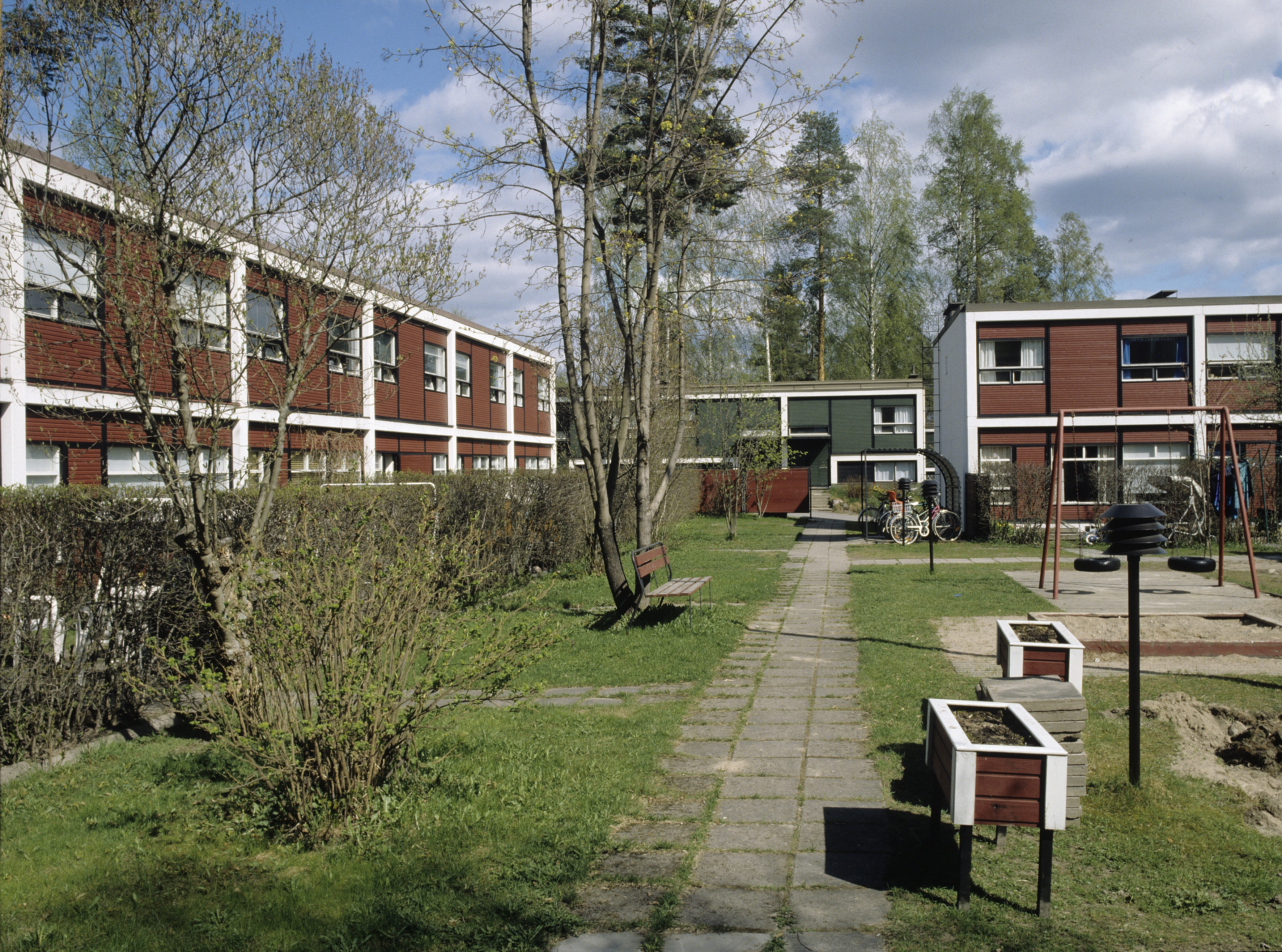 Jyväskylän Kortepohjan asuma-alue kuvattuna sisäpihalta päin.